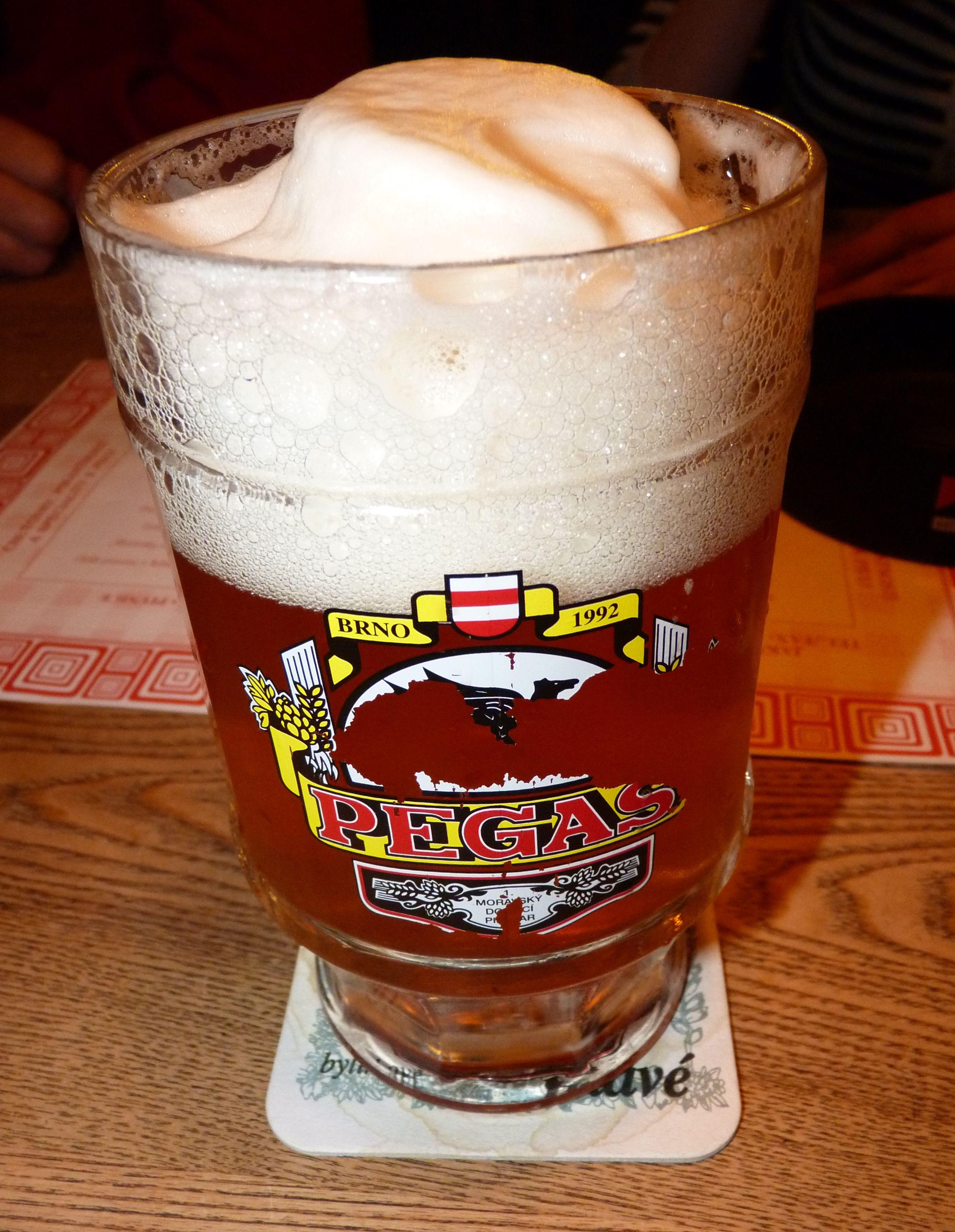 Ležák Pegas, pivovar Pegas, Brno